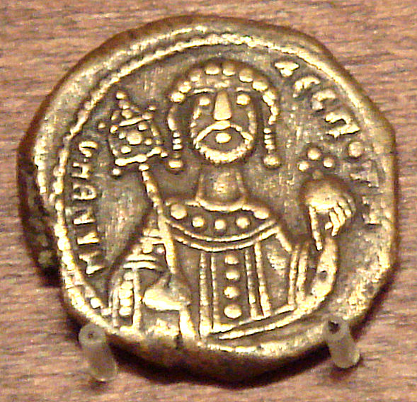 Manuel I Comnene copper coin